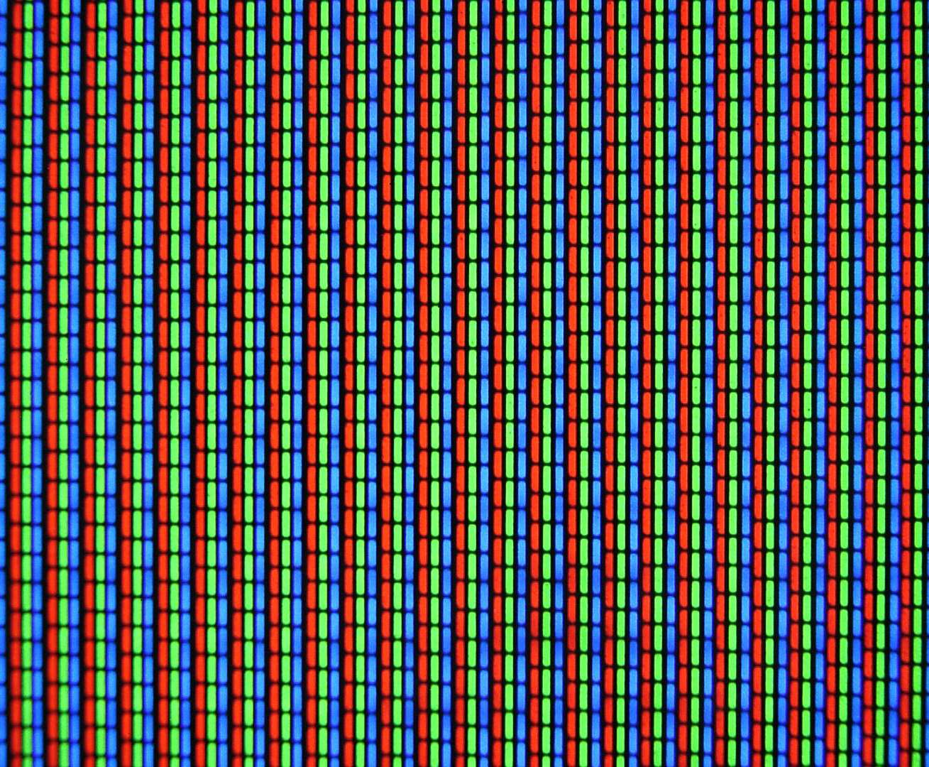 Beschreibung: Makroaufnahme einer Black-Matrix-Bildröhre Quelle: selbst fotografiert (Ricoh Caplio RZ1) Fotograf: MasterFX Datum: 7. Juni 2005